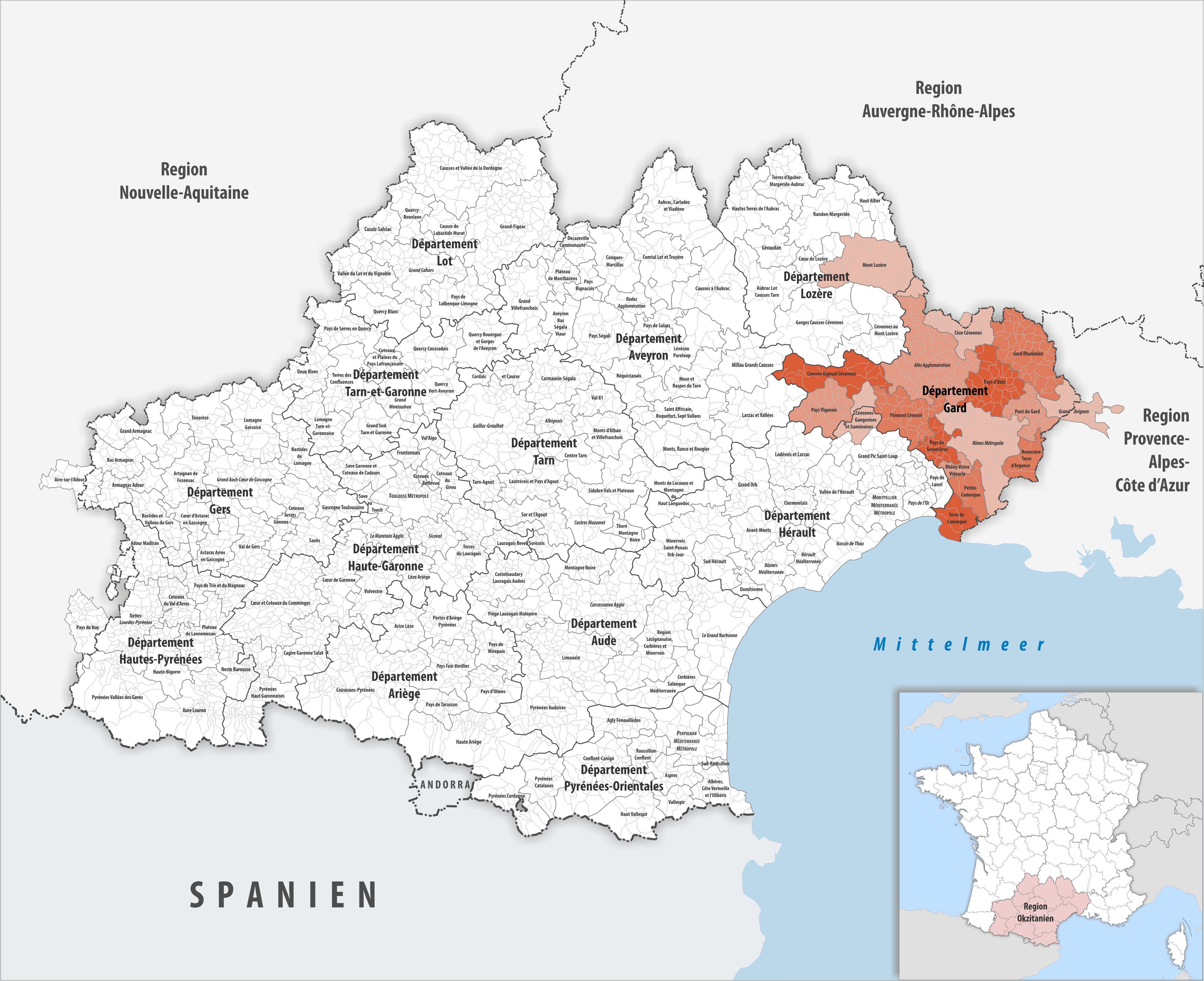 Gemeindeverbände im Département Gard